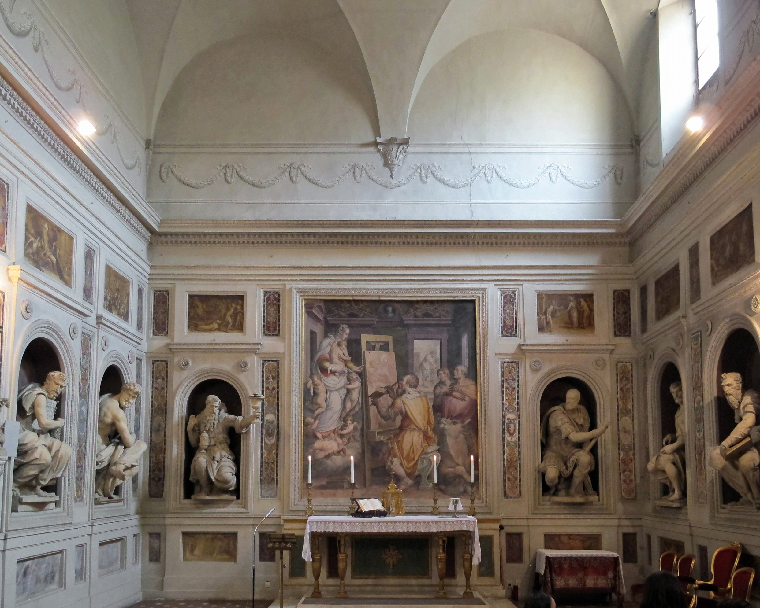 Lasta della tomba comune degli asrtisti nella Cappella di San Luca alla Santissima Annunziata, Firenze, opera del Montorsoli. Qui vennero sepolti numerosi artisti, da Pontormo al Cellini, dallo stesso Montorsoli a Andrea Sansovino. L'ultimo fu Lorenzo Bartolini nel 1848